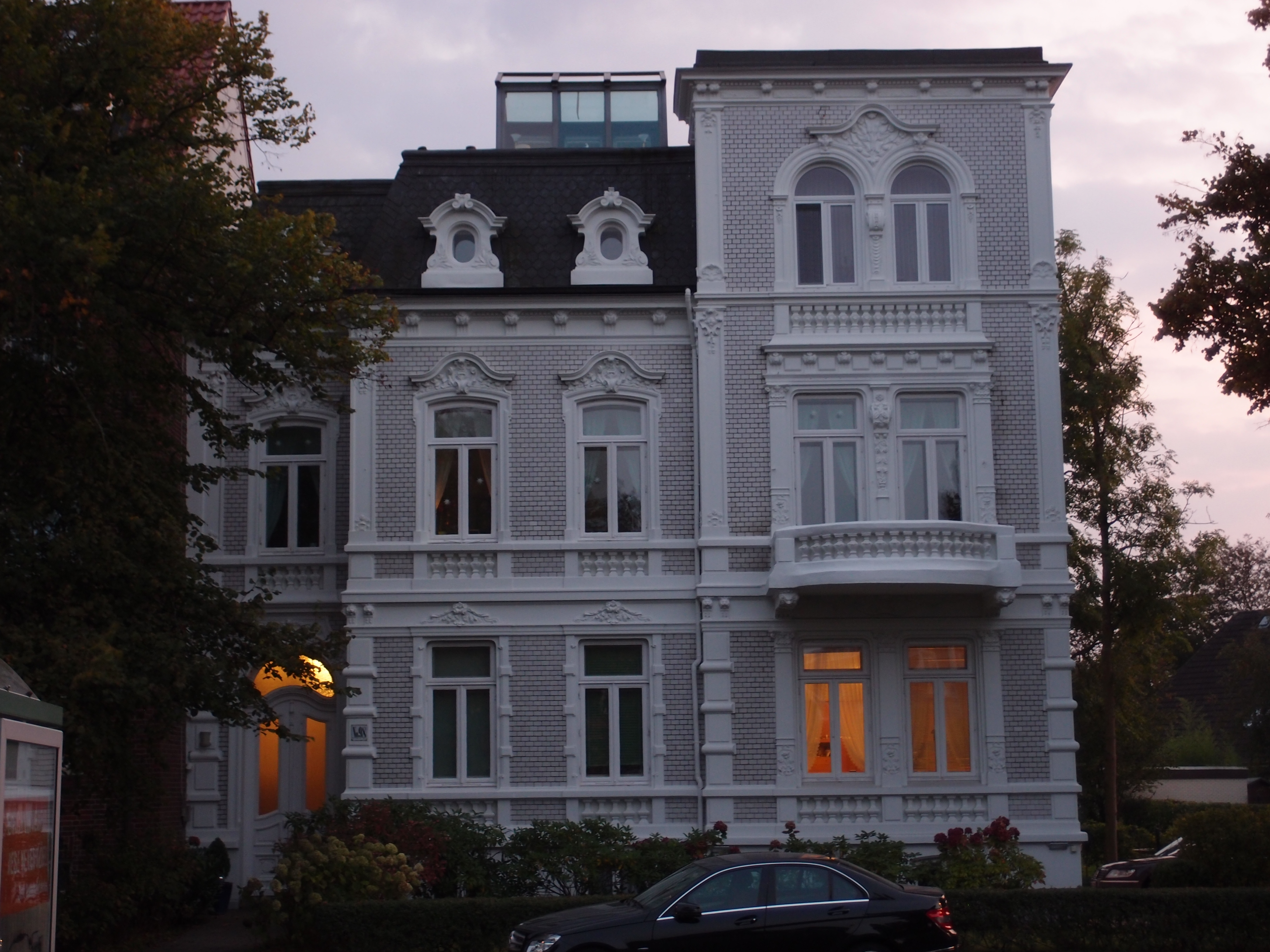 Cuxhaven Strichweg 98 Strassenansicht